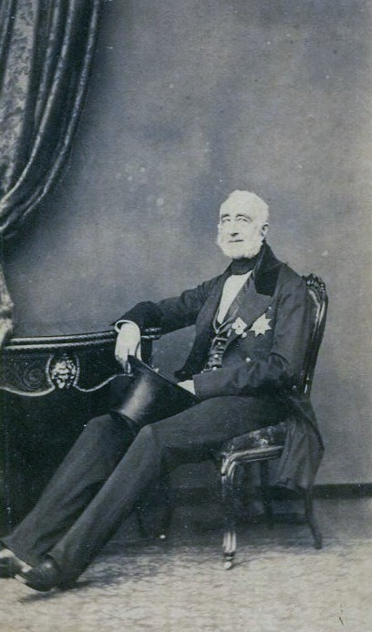 Граф Александр Николаевич Толстой (1793—1866)